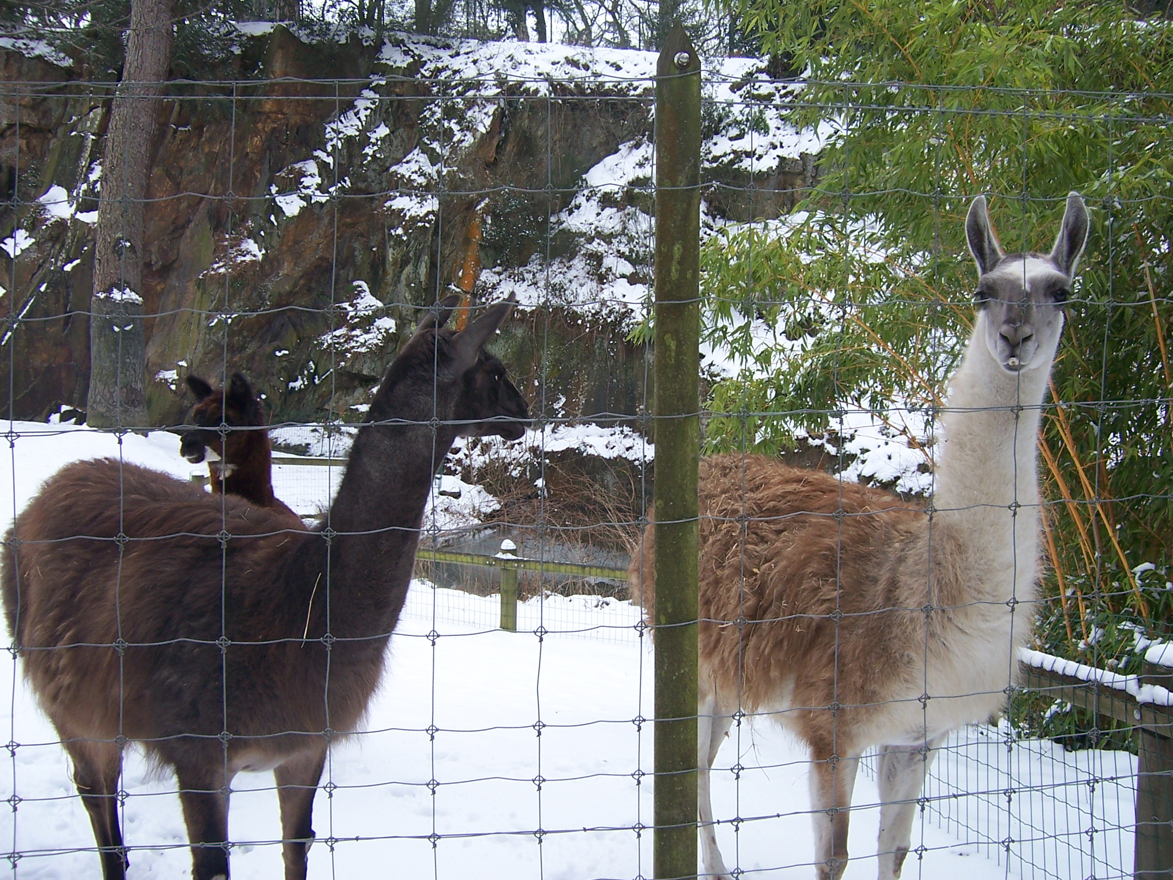 Enclos des lamas à l'étang Saint-Nicolas, dans l'agglomération d'Angers en Maine-et-Loire (France).